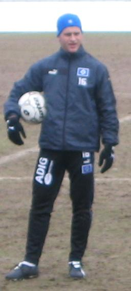 german football player Rene Klingbeil, selfshot photo